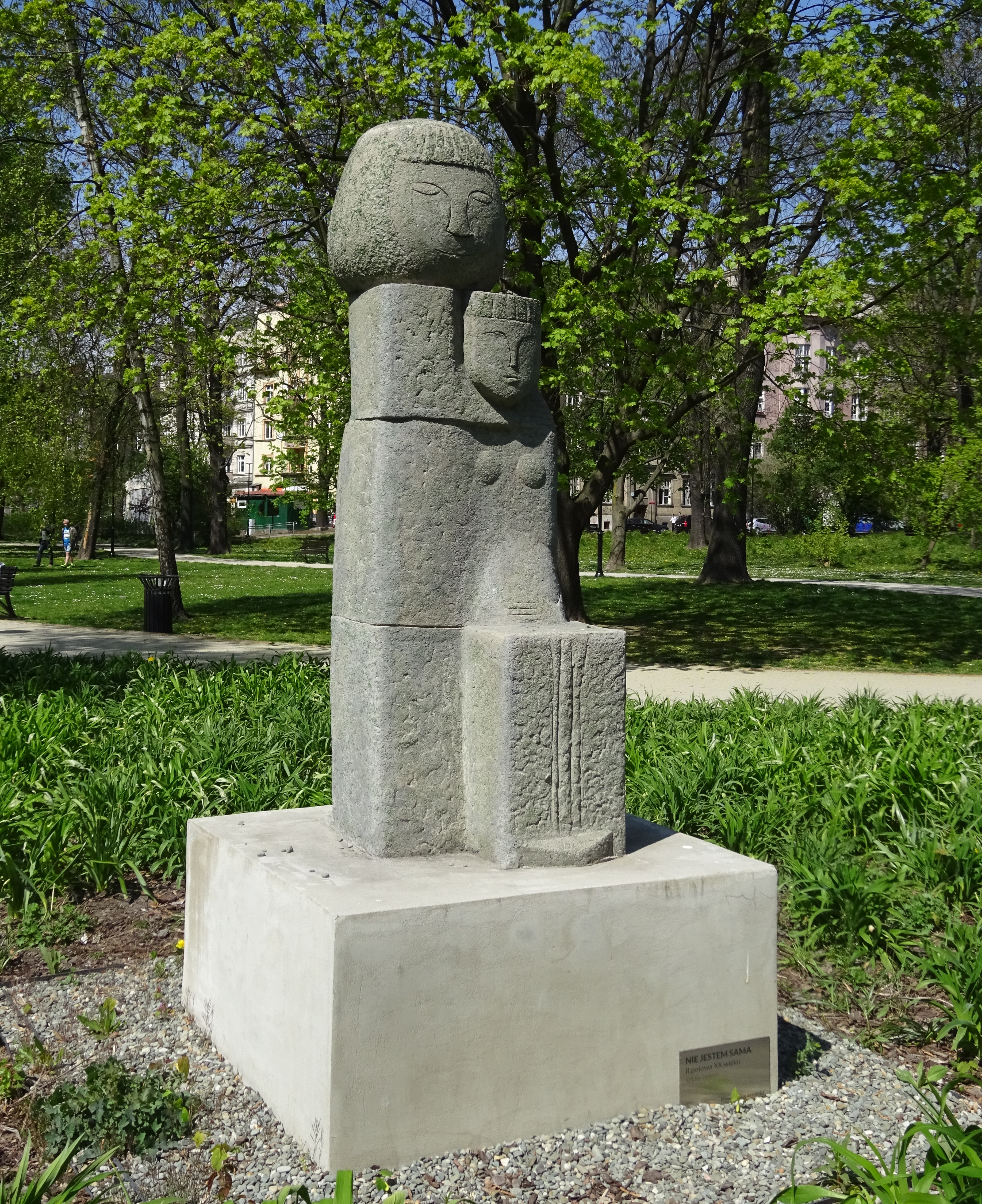 Rzeźba „Nie jestem sama”, autorstwa Romana Tarkowskiego z II połowy XX wieku, znajdująca się w Parku Krakowskim w Krakowie.